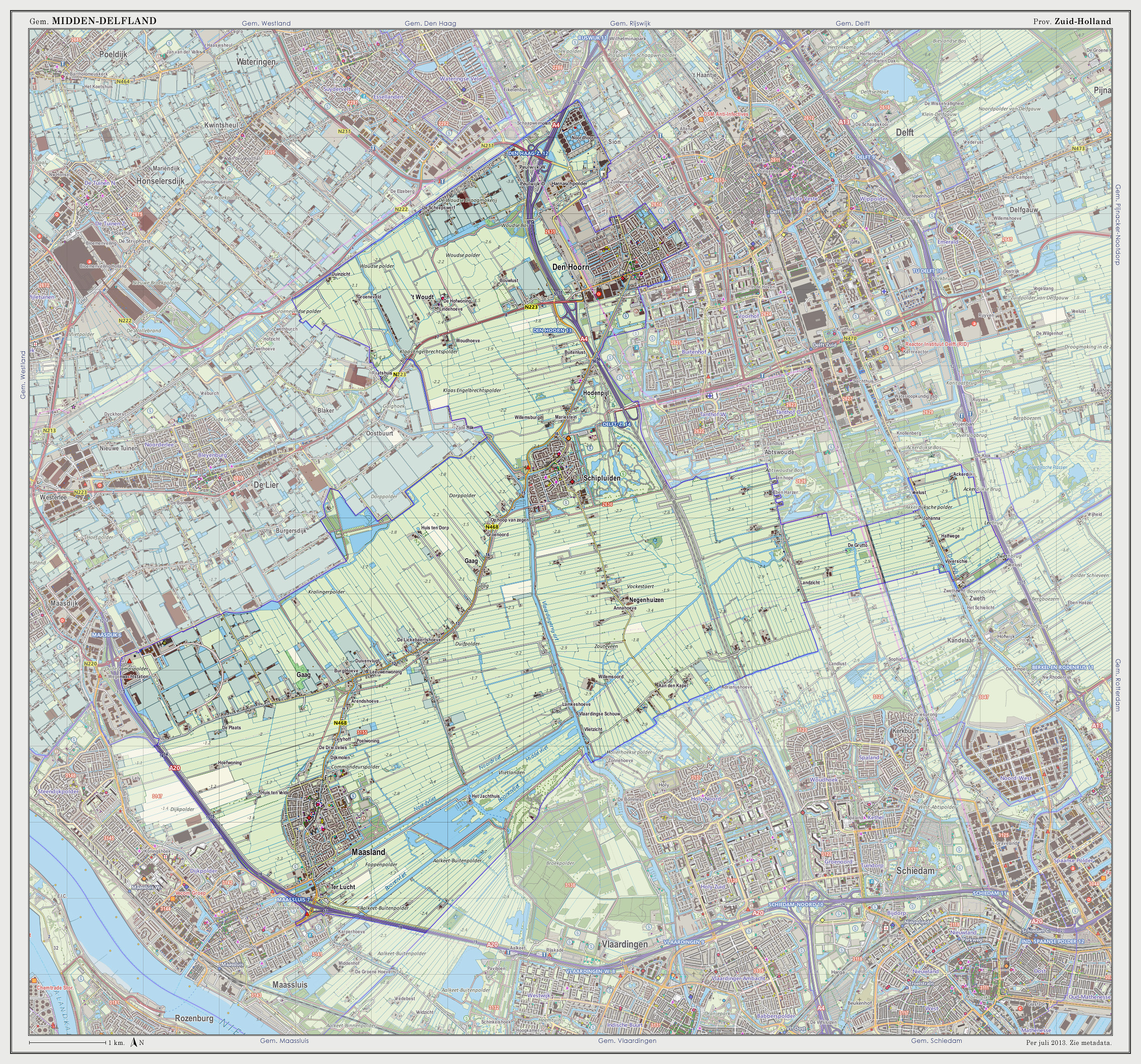 Topografische kaart van gemeente Midden-Delfland (2013). Samengesteld door Jan-Willem van Aalst op basis van de GML open geodata van de BRT/Top10NL (basisregistratie Topografie, Kadaster 2011), vrijgegeven door Kadaster onder de Creative Commons BY licentie. Additionele gegevens uit BAG (8 juli 2013), uit de Open Street Map (9 juli 2013) en uit de Risicokaart. Peildatum kaartbeeld: 9 juli 2013. Zie ook Gemeentenatlas.nl Samenstelling en kleurenschema: Jan-Willem van Aalst, met QuantumGIS en Photoshop. Zie ook de Legenda.